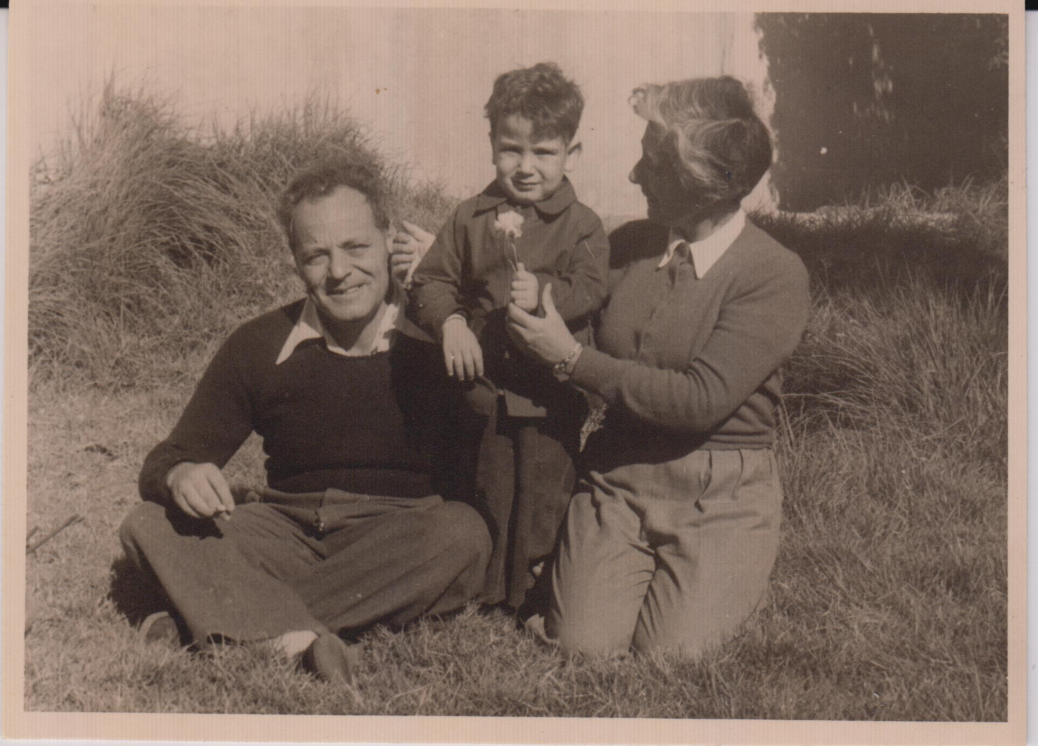 תמונה של משפחת סימון ליד ביתם בבאר שבע, שנות החמישים